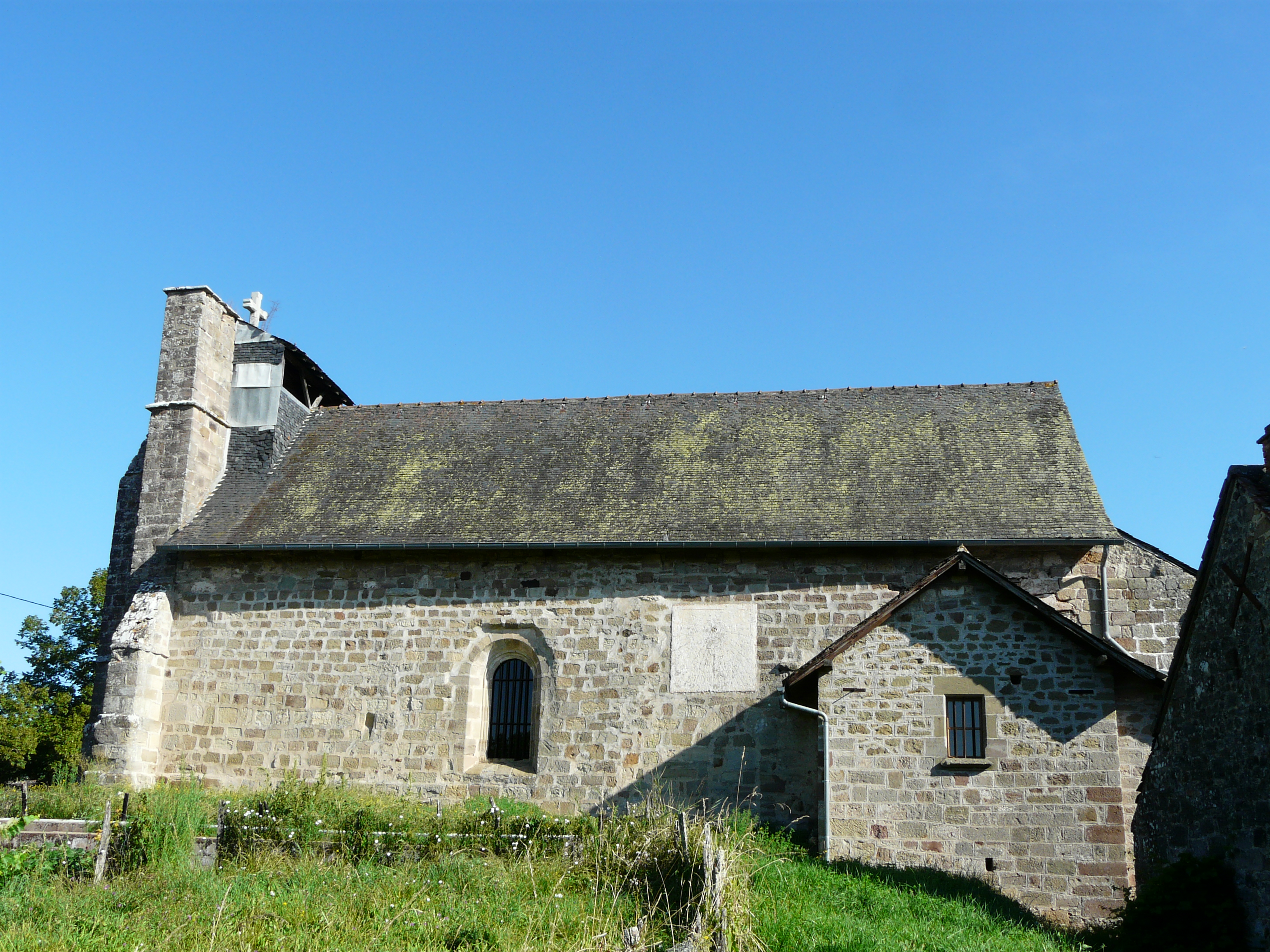 Le côté sud de l'église Notre-Dame-de-la-Nativité, La Feuillade, Dordogne, France.